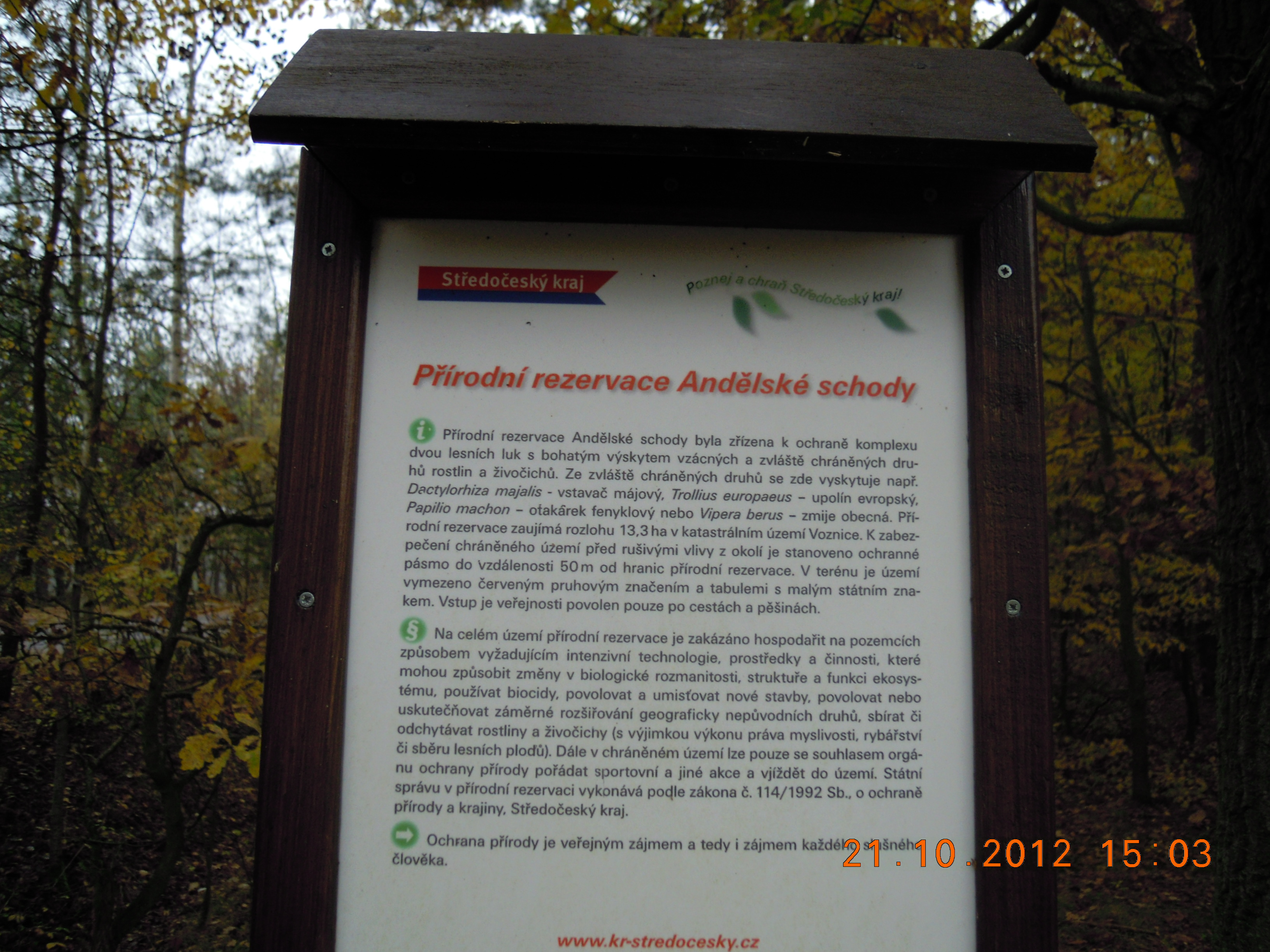 Prirodni rezervace Andelske schody